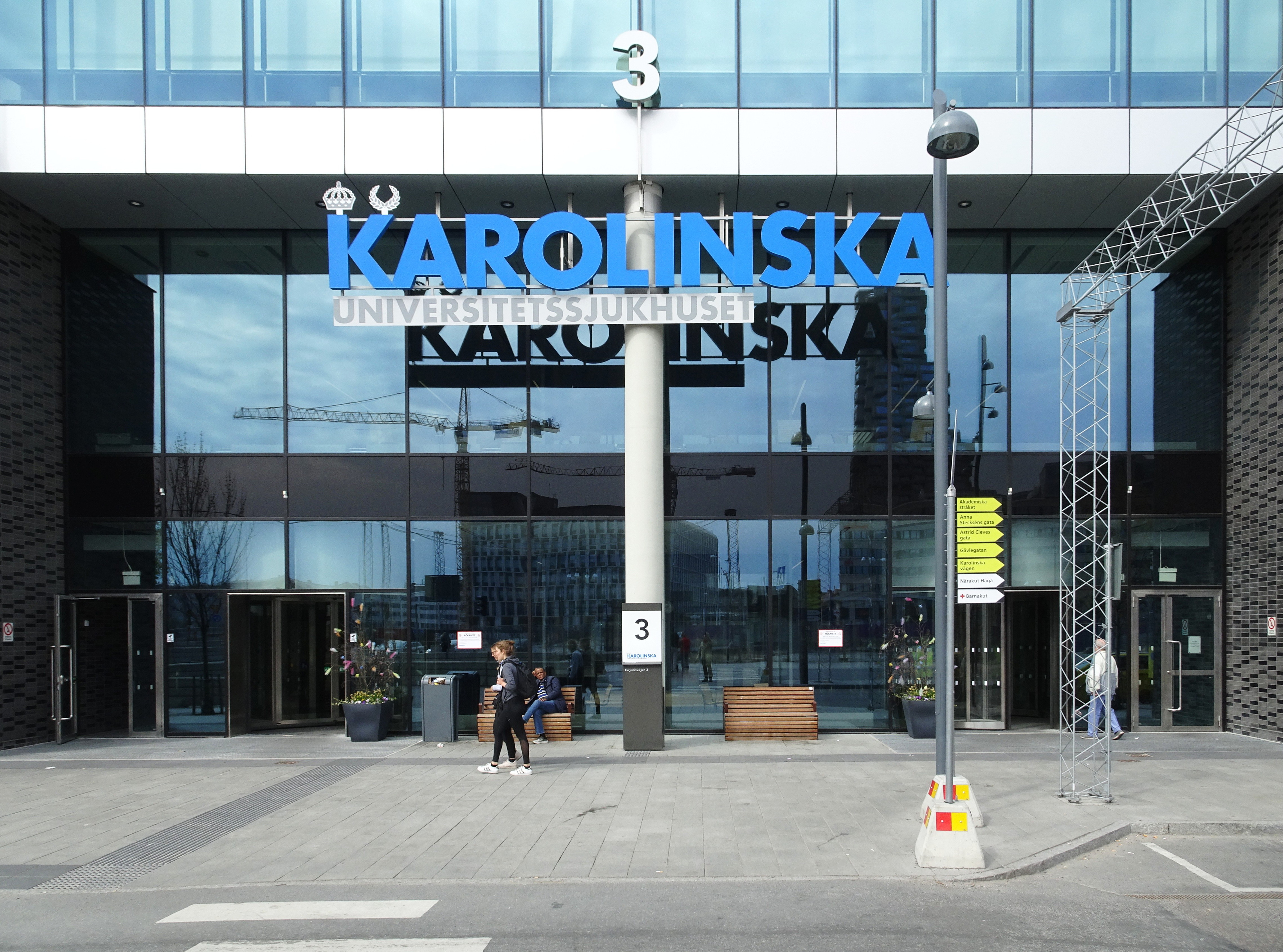 Nya Karolinska sjukhuset, huvudentré